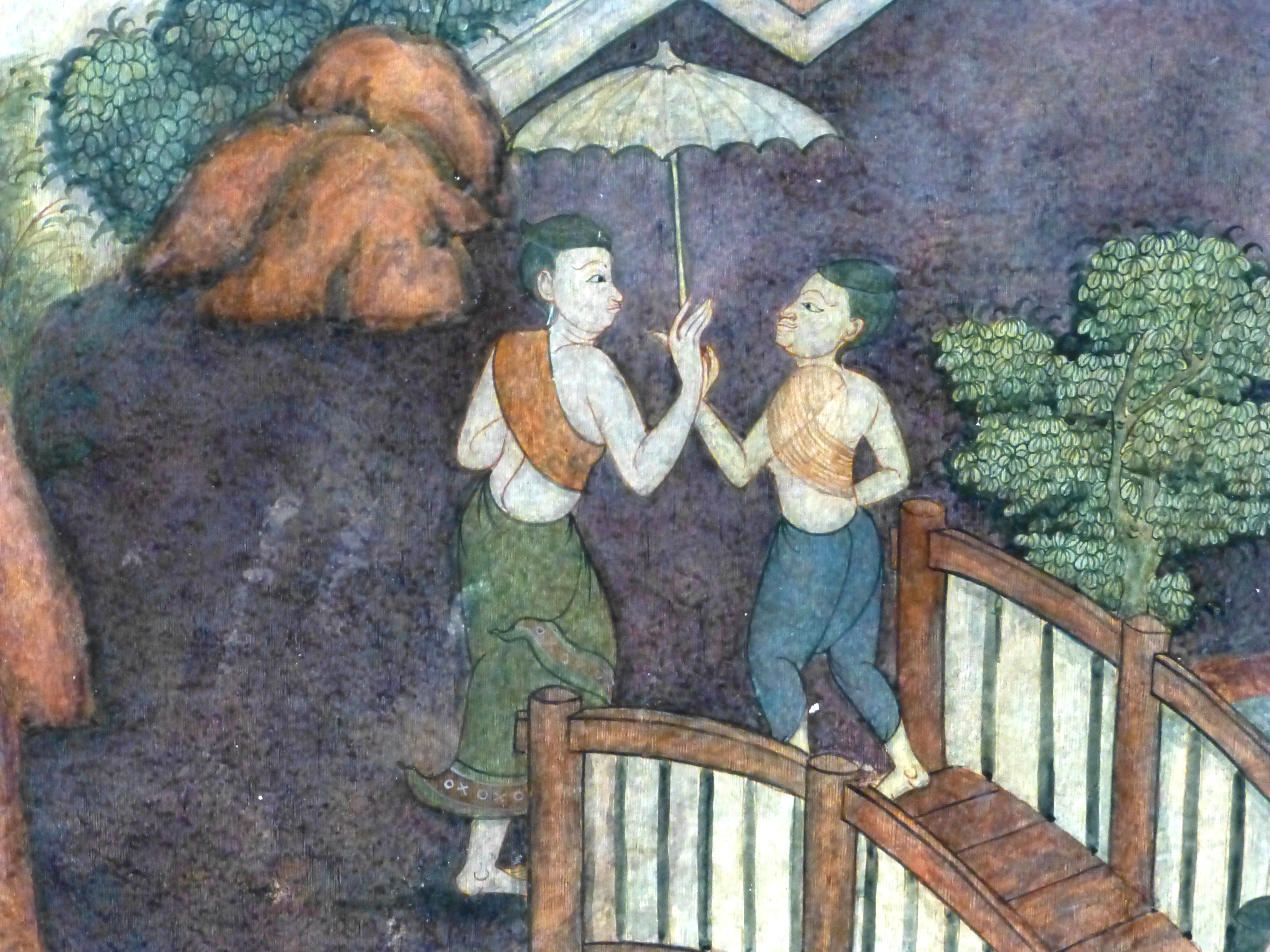 Wat Pho, Bangkok